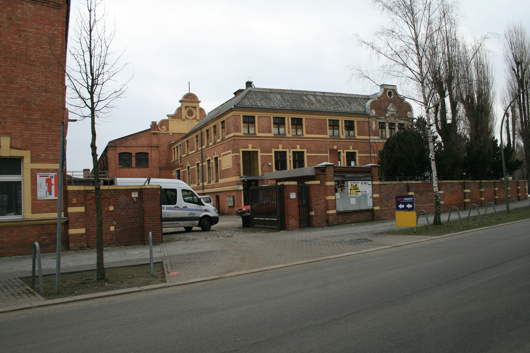 Berlin-Reinickendorf , Flottenstraße 50–53. Werksanlage C. L. P. Fleck Söhne.